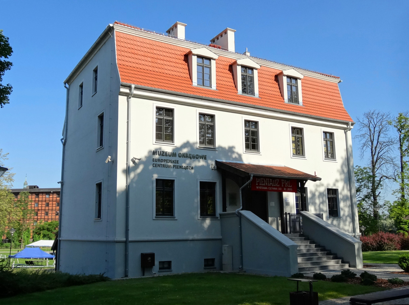 Europejskie Centrum Pieniądza na Wyspie Młyńskiej w Bydgoszczy. Budynek wzniesiony w XVII w., przebudowany w 1786 r. i na przełomie wieków XIX-XX na mieszkania dla urzędników młyna. Od 2008 r. użytkowany przez Muzeum Okręgowe im. L. Wyczółkowskiego.